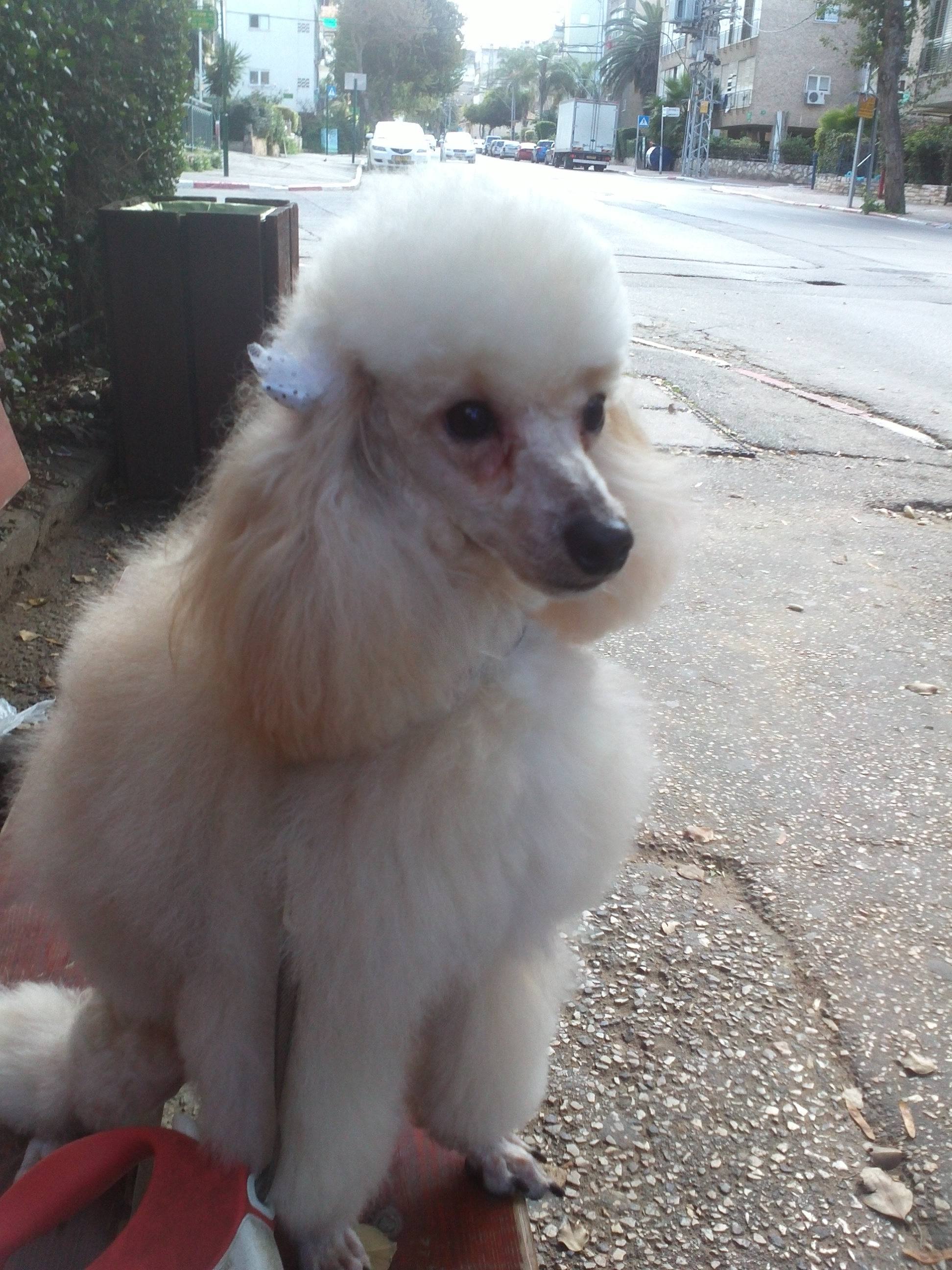 Той-пудель по кличке Рыжий